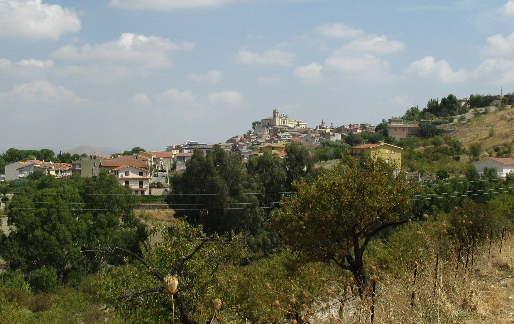 Panorama di Comitini.